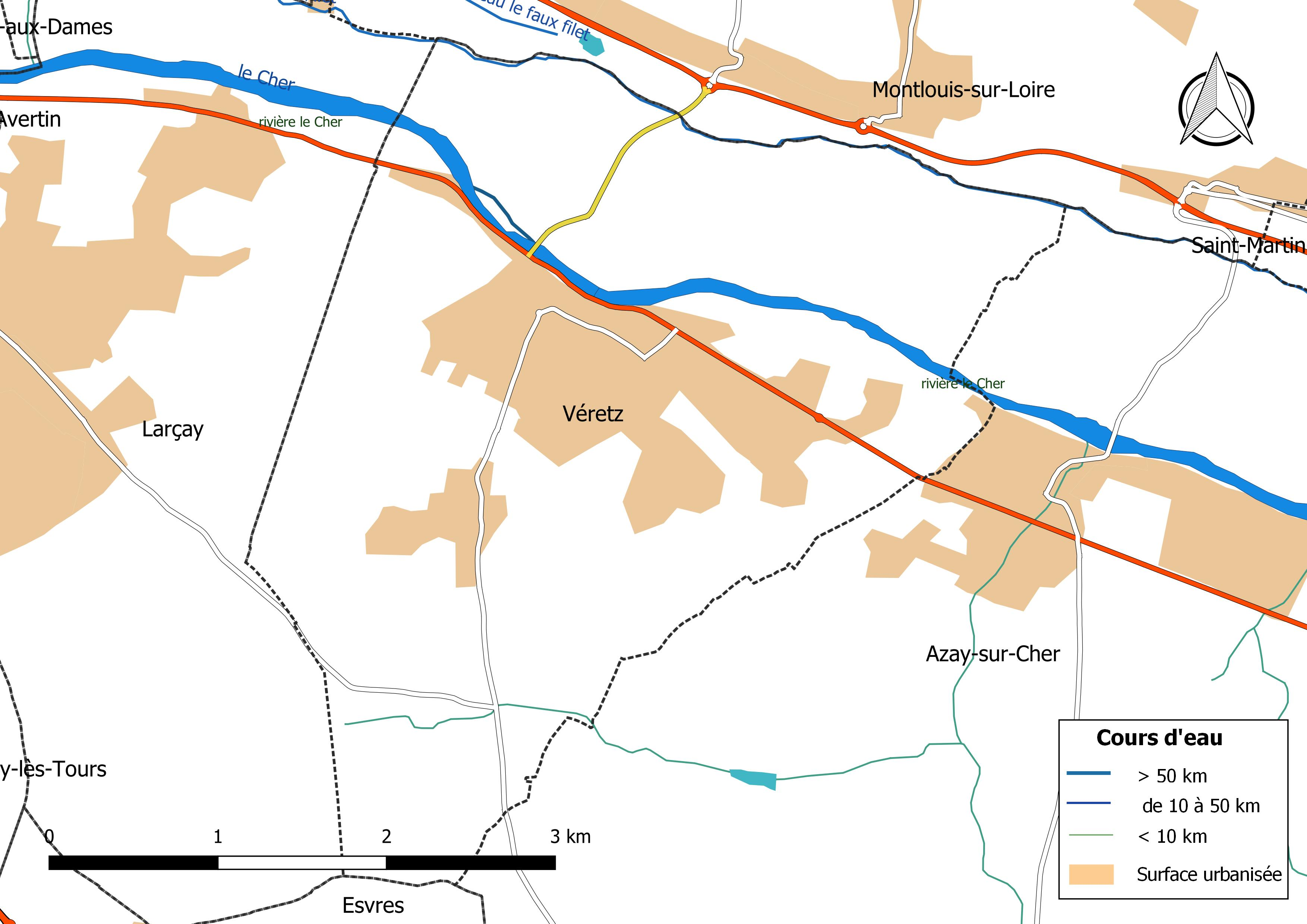 Carte du réseau hydrographique de la commune de Véretz (France).